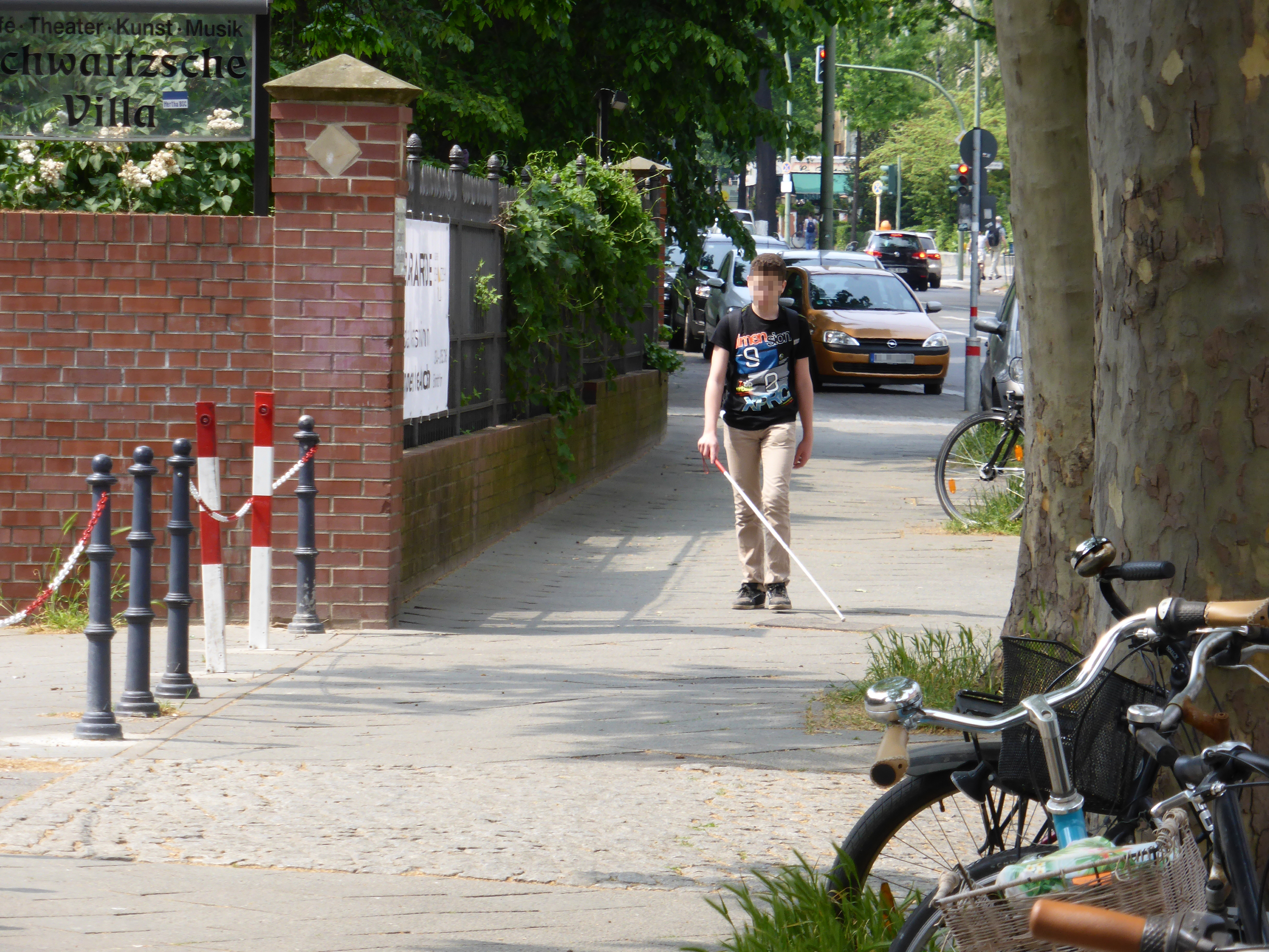 Tipptechnik beim Orientierungs- und Mobilitätsunterricht Zeune Schule